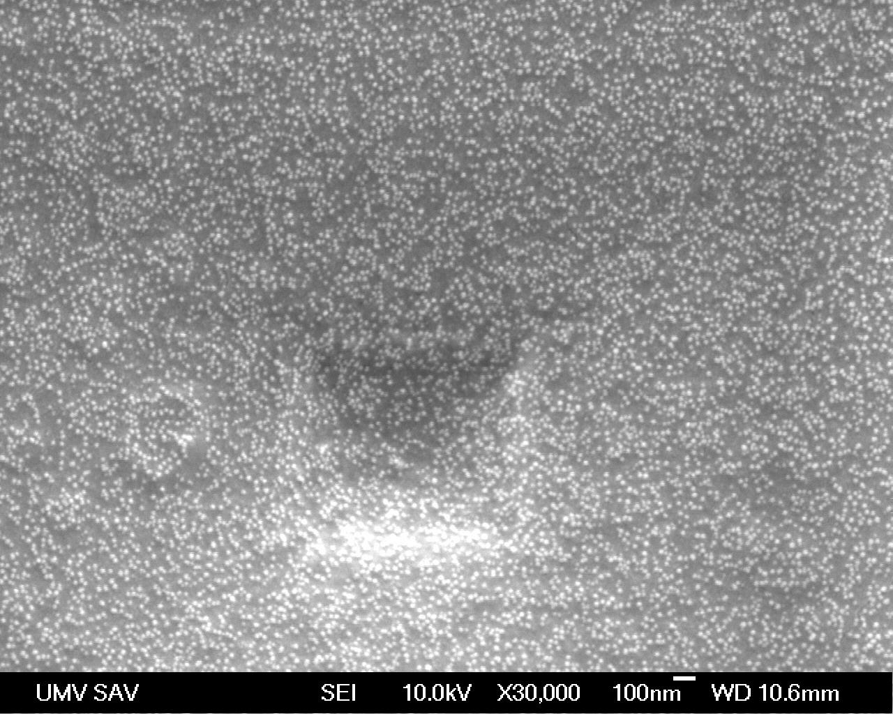 snímka povrchu upraveného zlatými nanočasticami